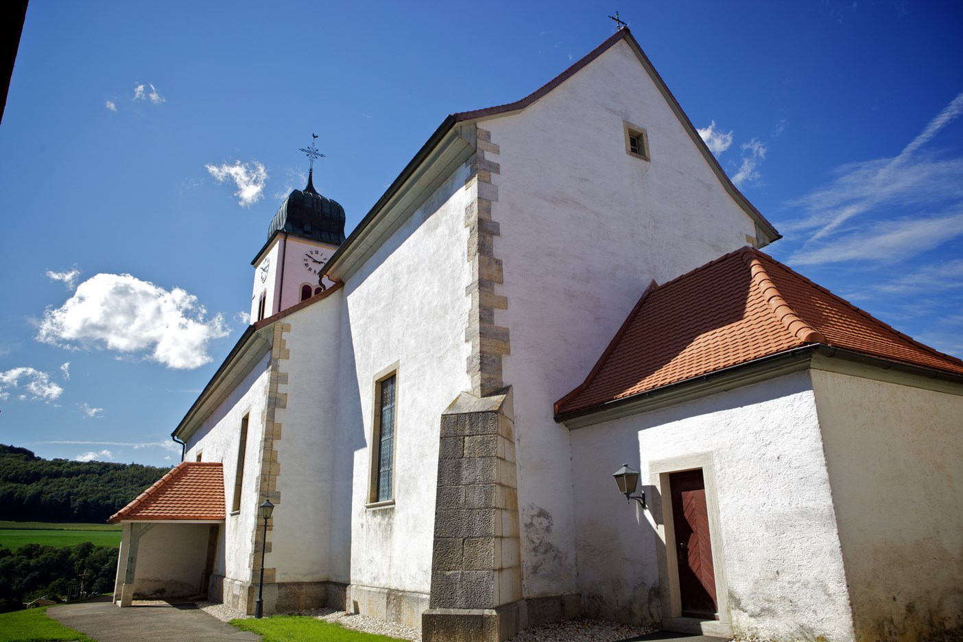 vue extérieure église de Bourrignon (Jura / Suisse)